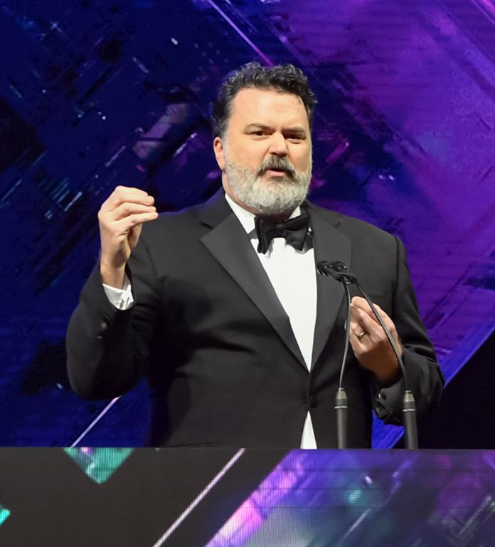 1D5_5327